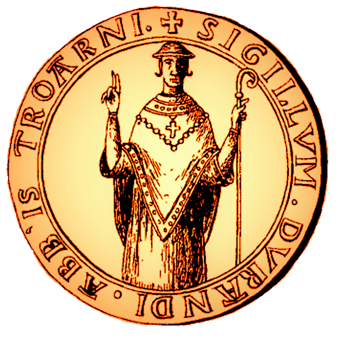 Abbaye de Troarn, Calvados, Sceau de l'abbé Durand (image du domaine public retouchée)